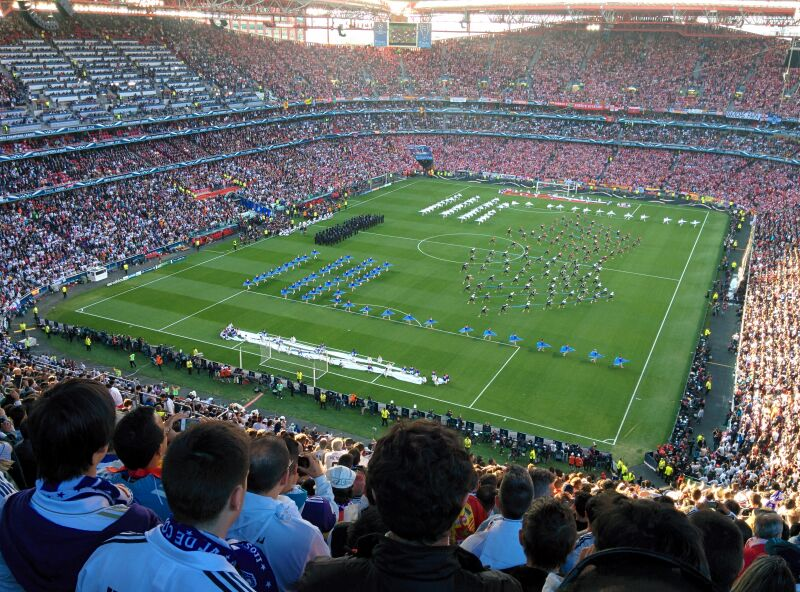 Real Madird 4:1 Atletico 2014 Final Champions Lisboa